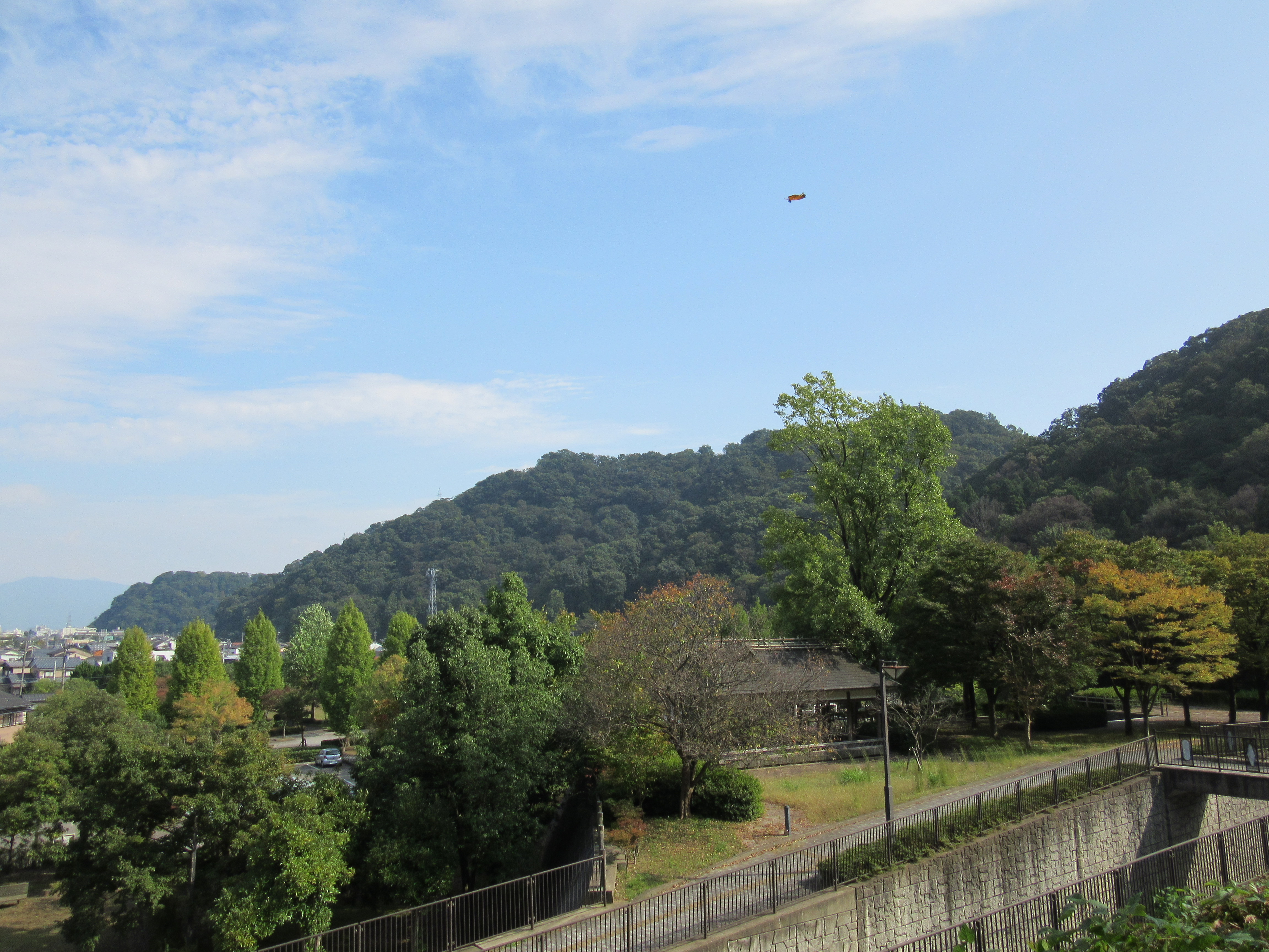 八幡山 (福井県)